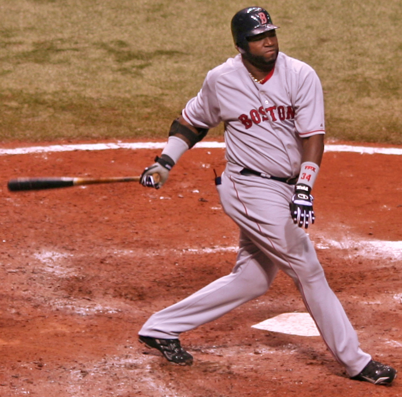 Photograph taken by Googie Man 05:11, 22 September 2007 . . Googie man . . 785×775 (545 KB)